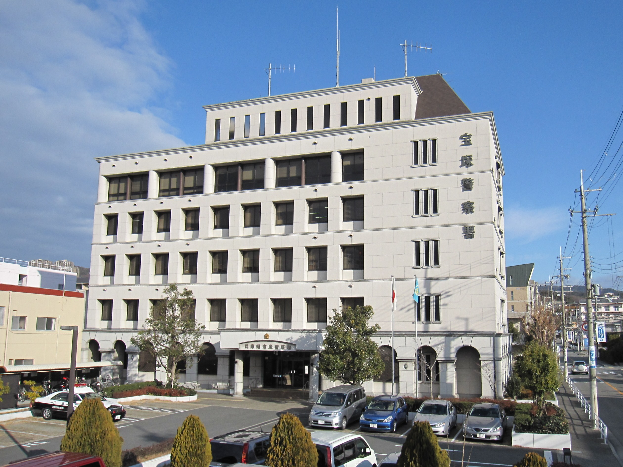 宝塚警察署